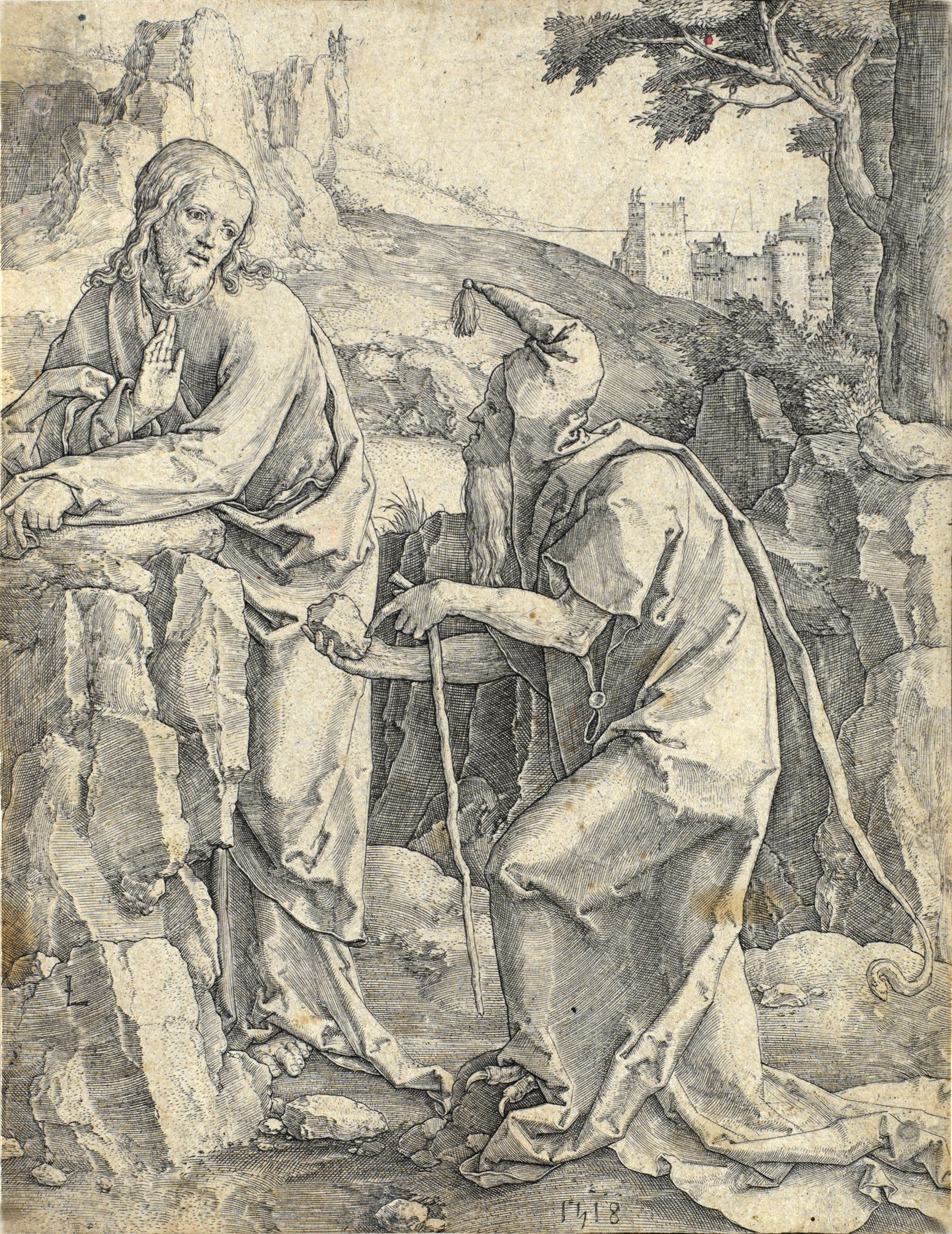 Lucas van Leyden: Kristus pokoušen ďáblem (1518), mědiryt, I. stav, 173x133 mm, Národní galerie v Praze